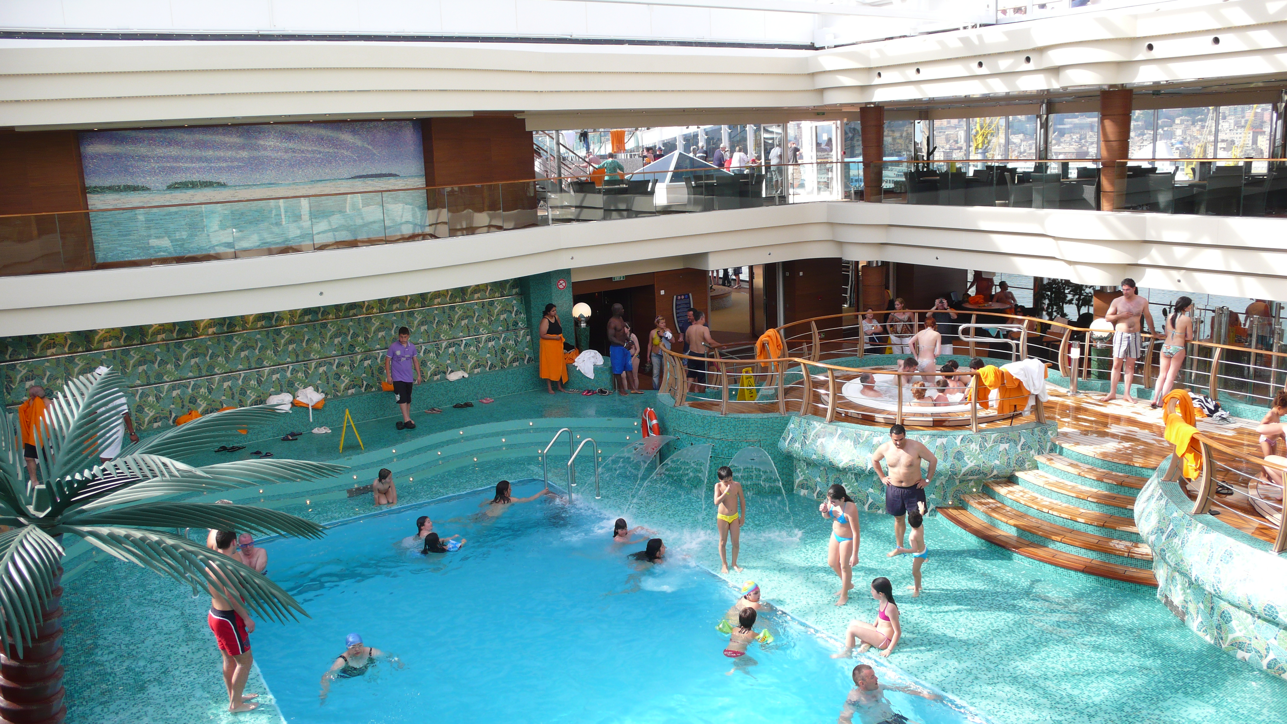 Foto Personale della mia crociera Caracò Antonio